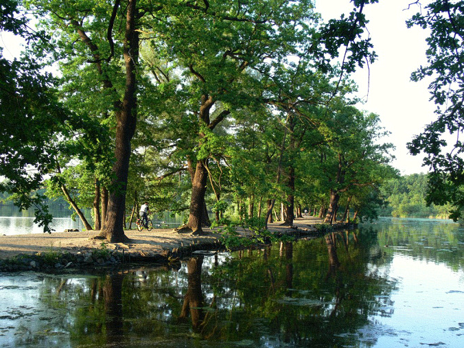 Riddagshäuser Teiche. Neuer Bleeksteich, Dr.-Willke-Weg und Kreuzteich (links).